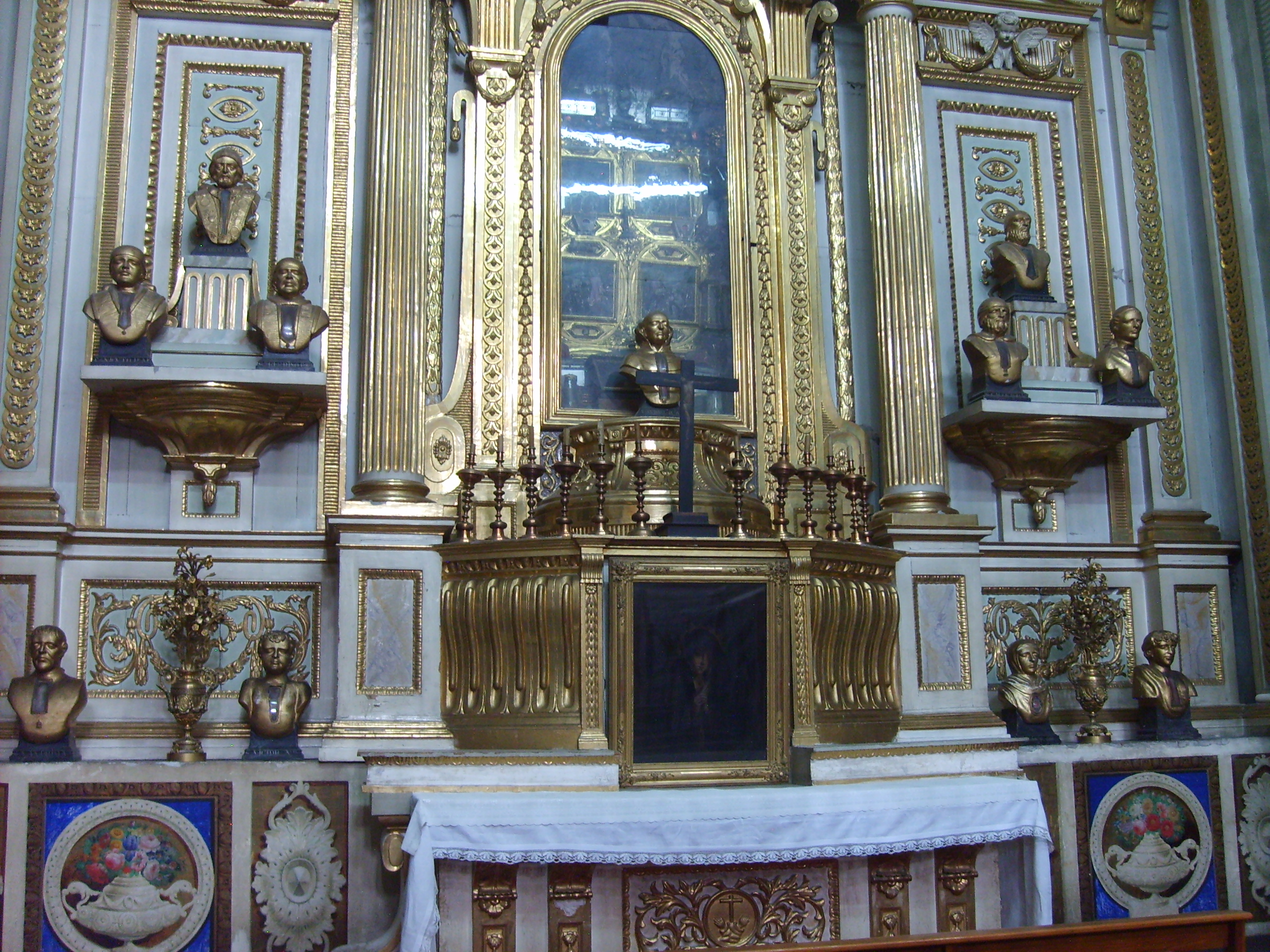 Capilla de las reliquias de la Catedral de Puebla.